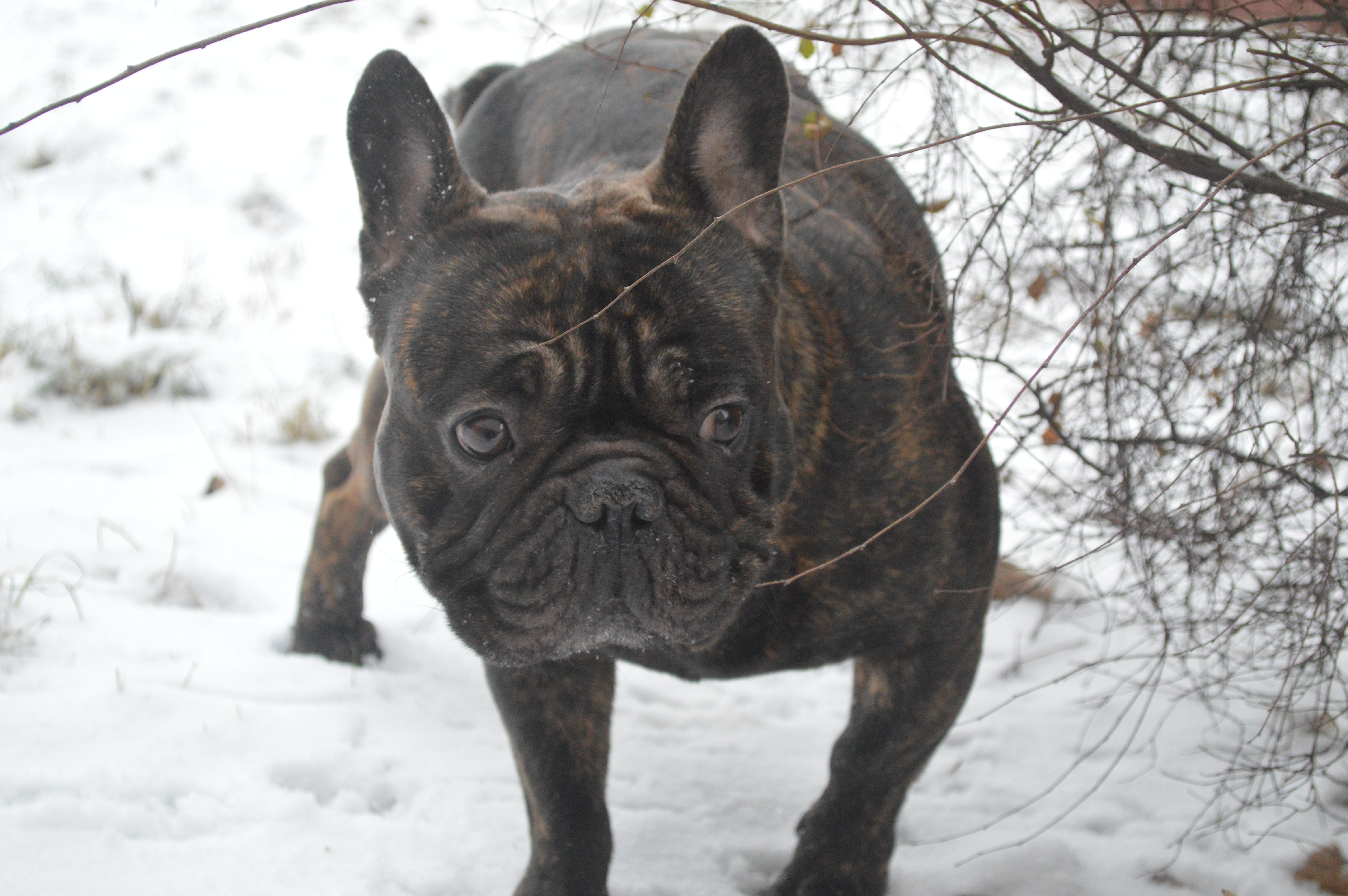 Francouzský buldoček